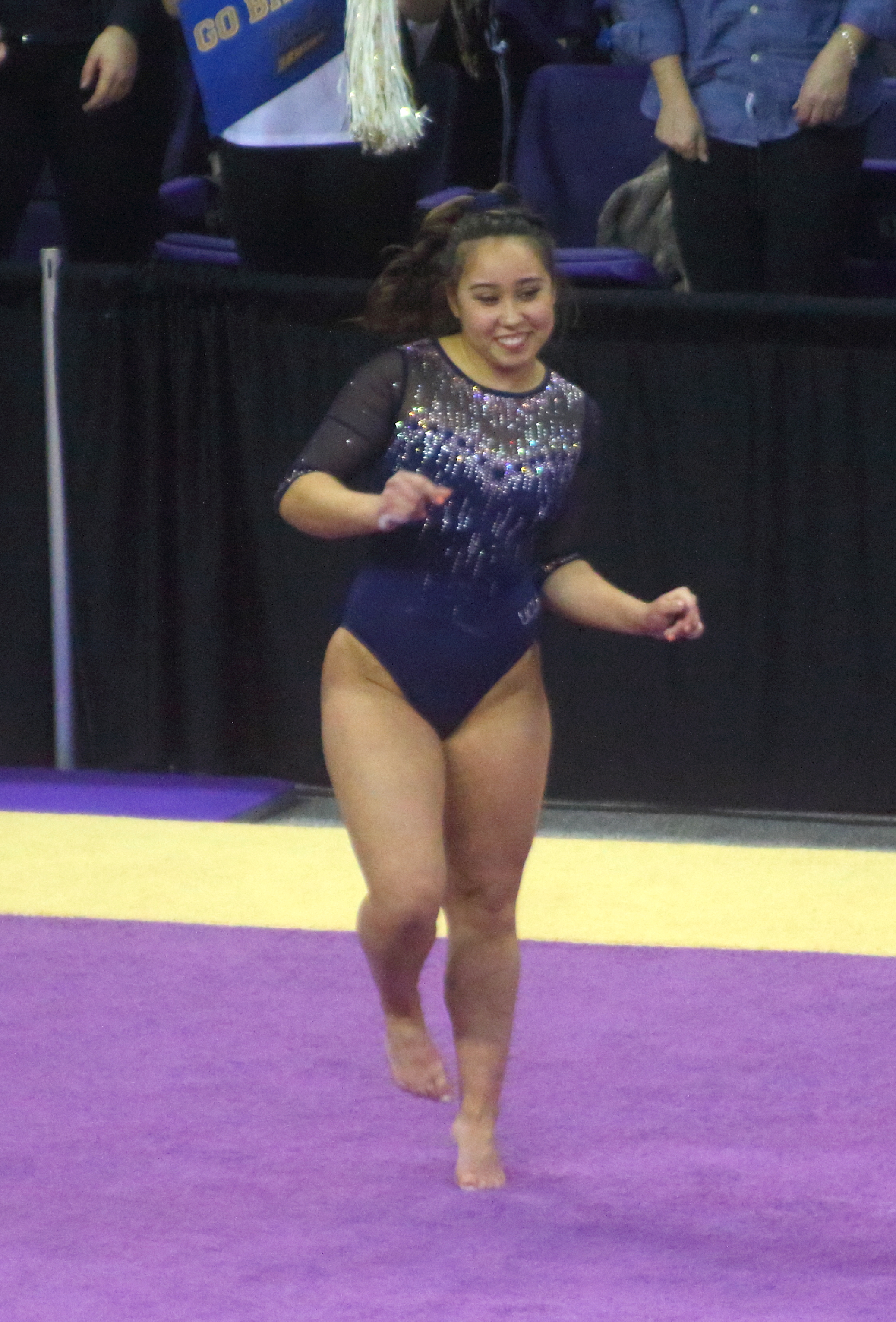 Katelyn Ohashi - UCLA